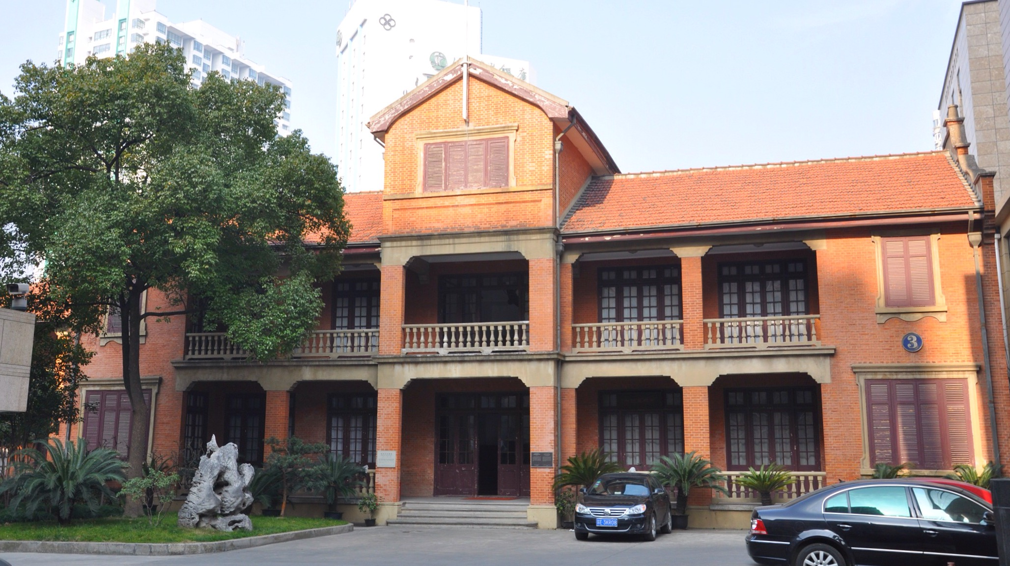 上海特别市政府旧址 平江路48号